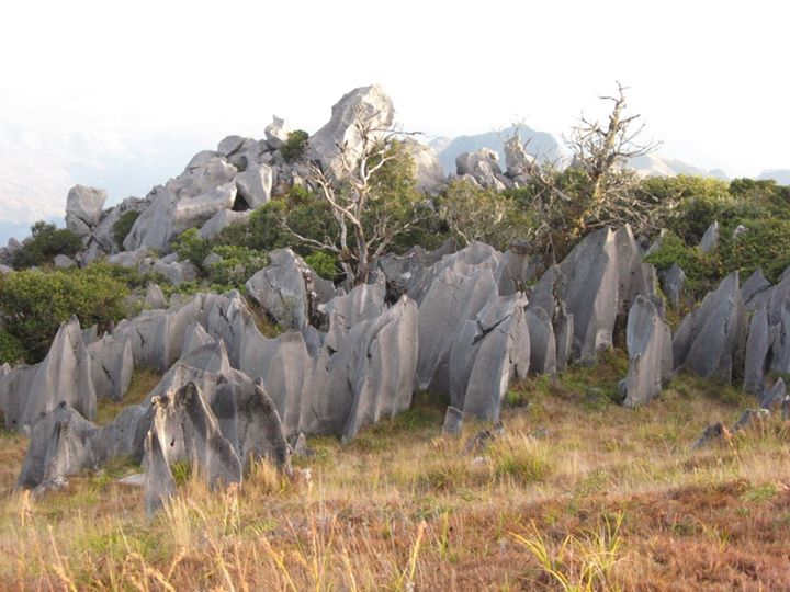 Tetun: Matebian tutun